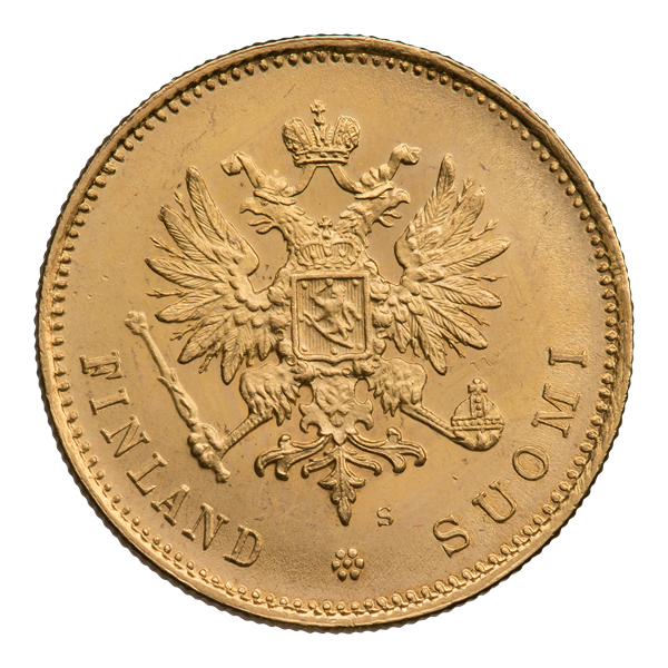 Двадцать марок 1913 г. (аверс). Биткин 391. Двуглавый орёл с распростёртыми крыльями под тремя коронами; из верхней короны спускается развевающаяся Андреевская лента; на груди орла щит с гербом Великого Княжества Финляндского, окружённый цепью ордена св. Андрея Первозванного. В лапах орла скипетр и держава. Под орлом знак директора монетного двора: S (Isak Gustaf Sundell). Внизу надпись полукругом: FINLAND * SUOMI